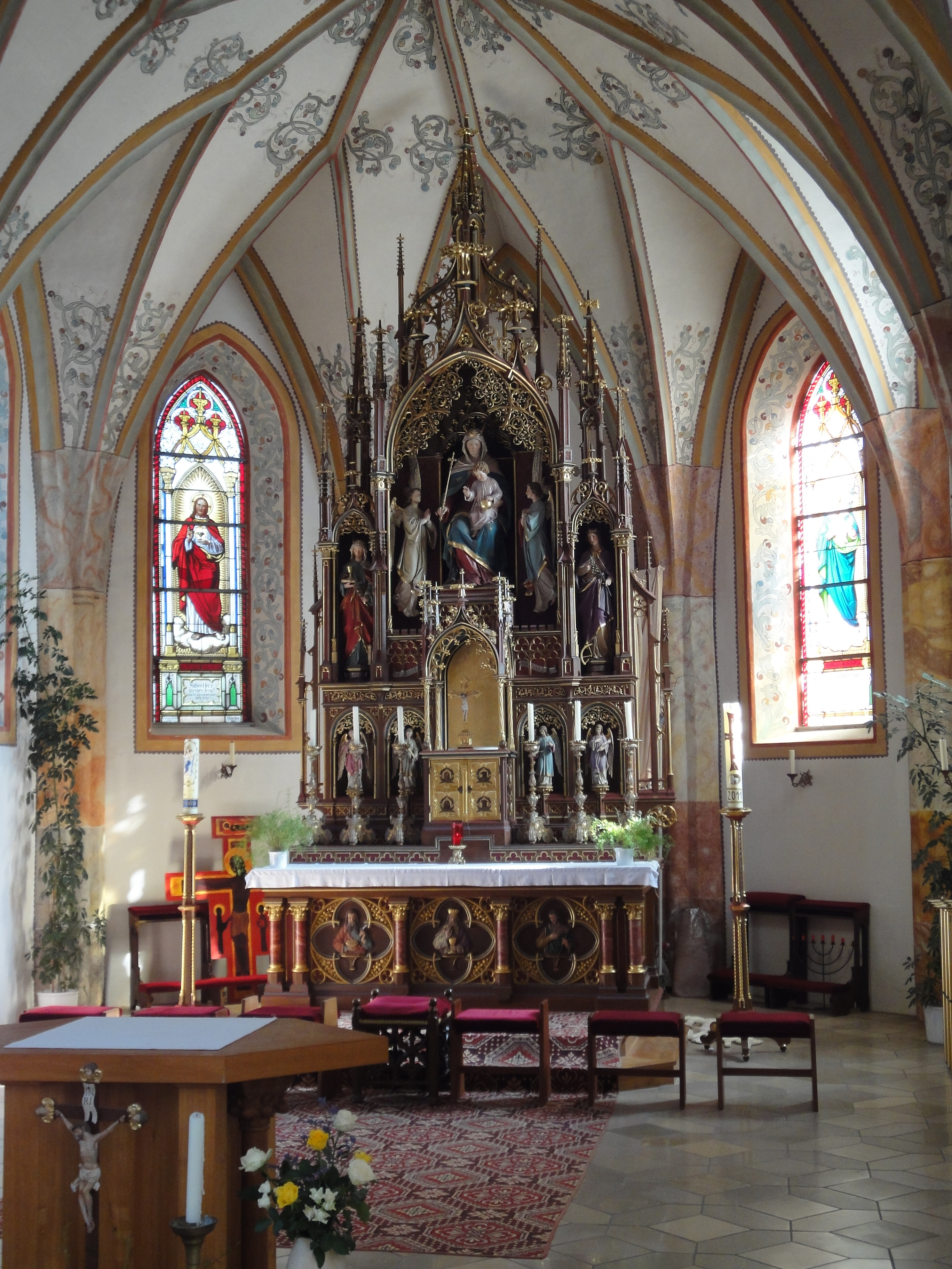 Katholische Pfarrkirche Mariä Geburt, Alling, Am Kirchberg 5: Hauptaltar